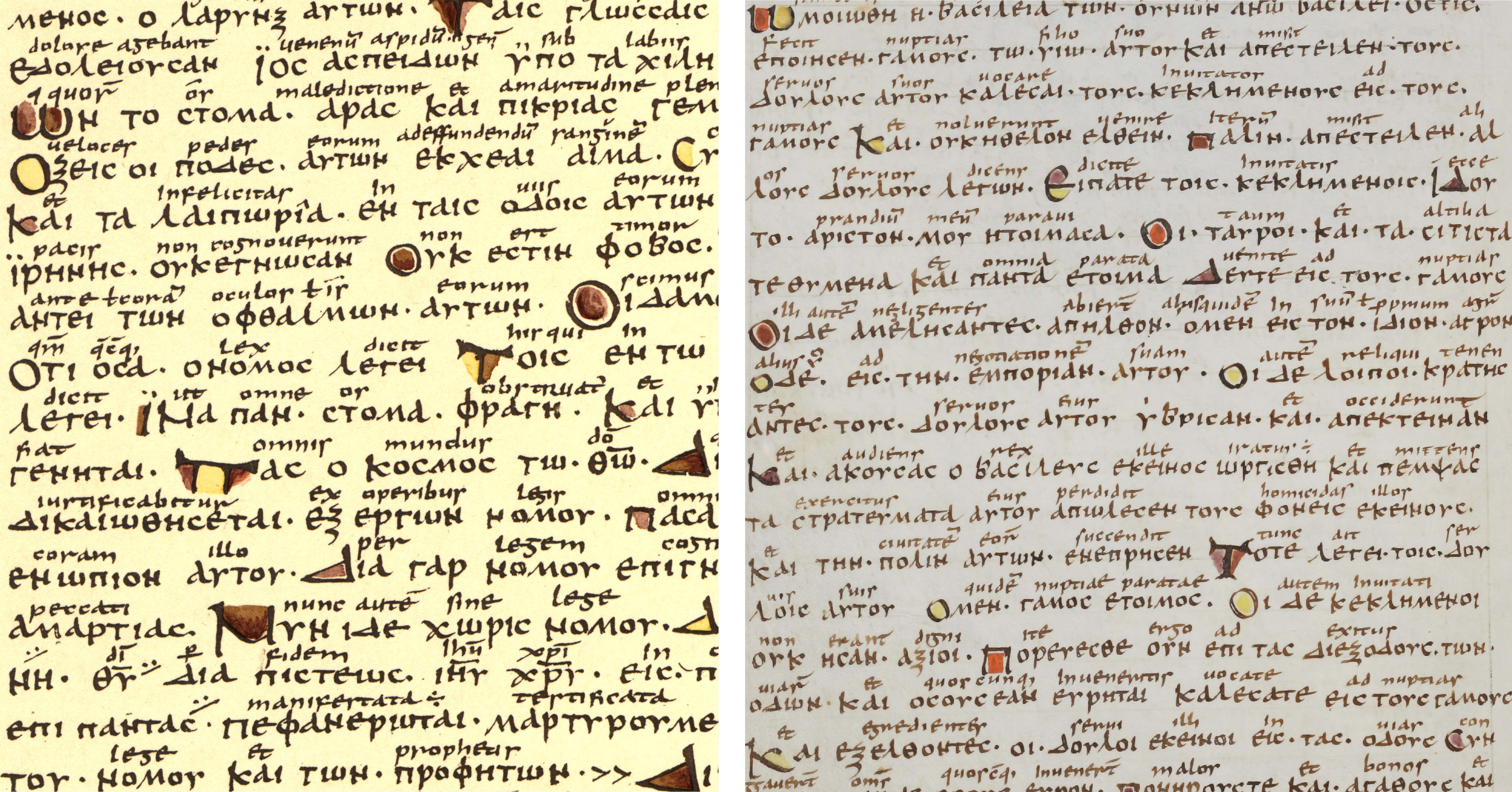 a page from Codex Boernerianus compared with a page from Codex Sangallensis 48